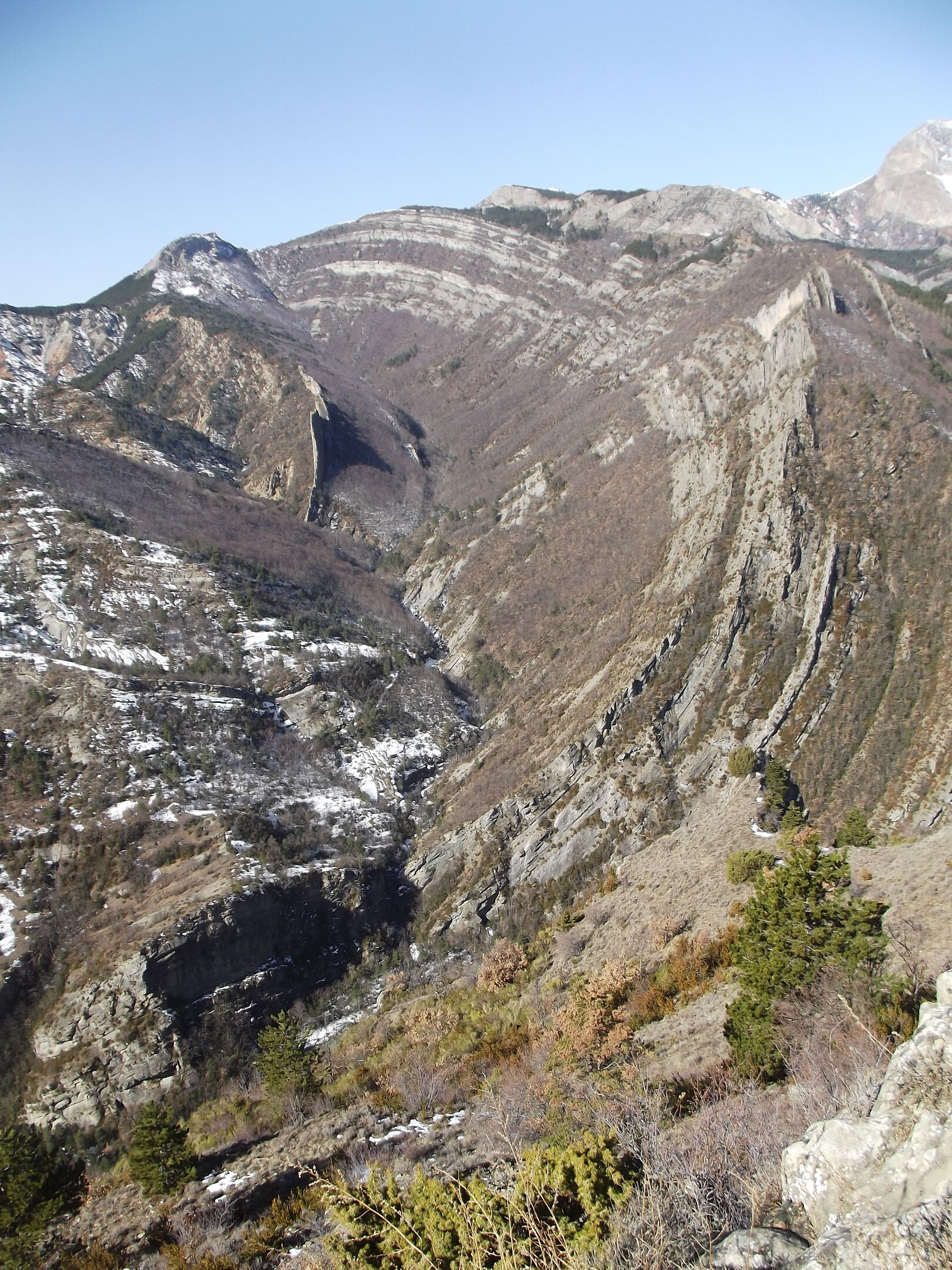 Vélodrome de la Robine (vue classique)